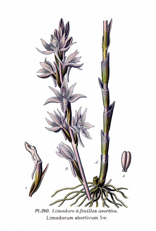 Limodorum abortivum Sw.